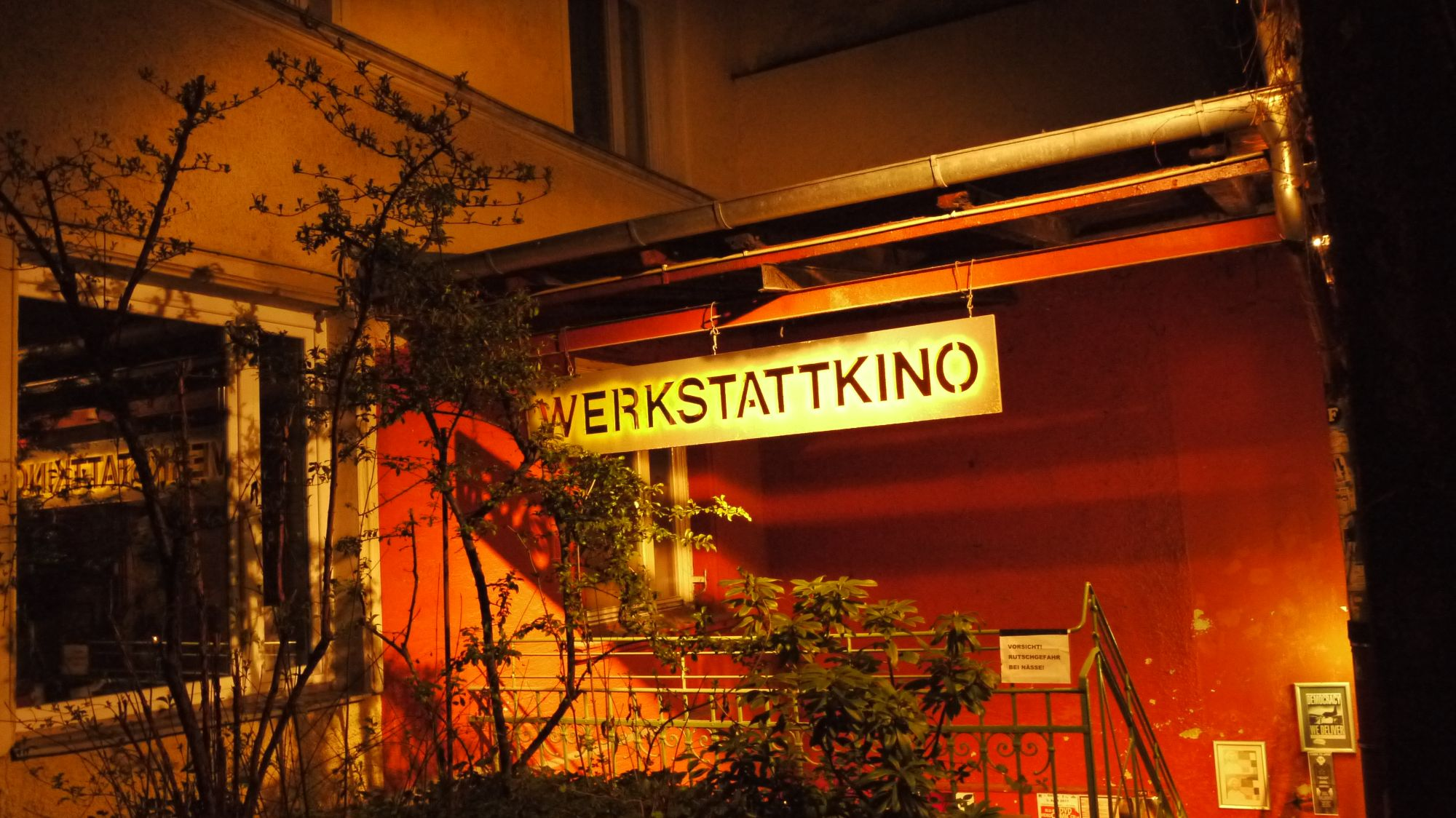 Werkstattkino Munich - Eingang